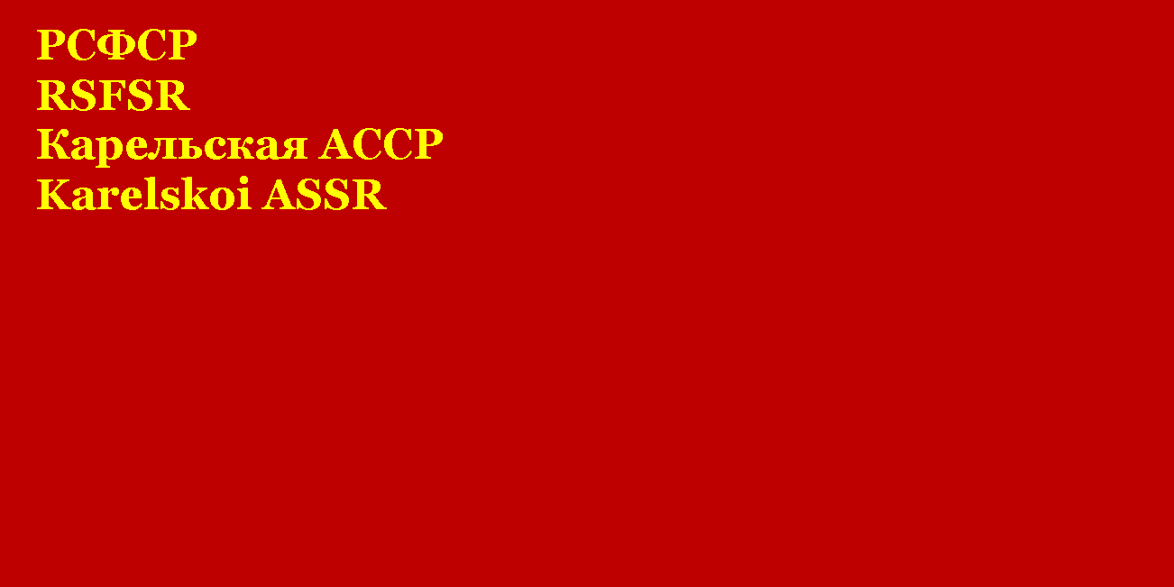 Флаг Карельской АССР с декабря 1937 года